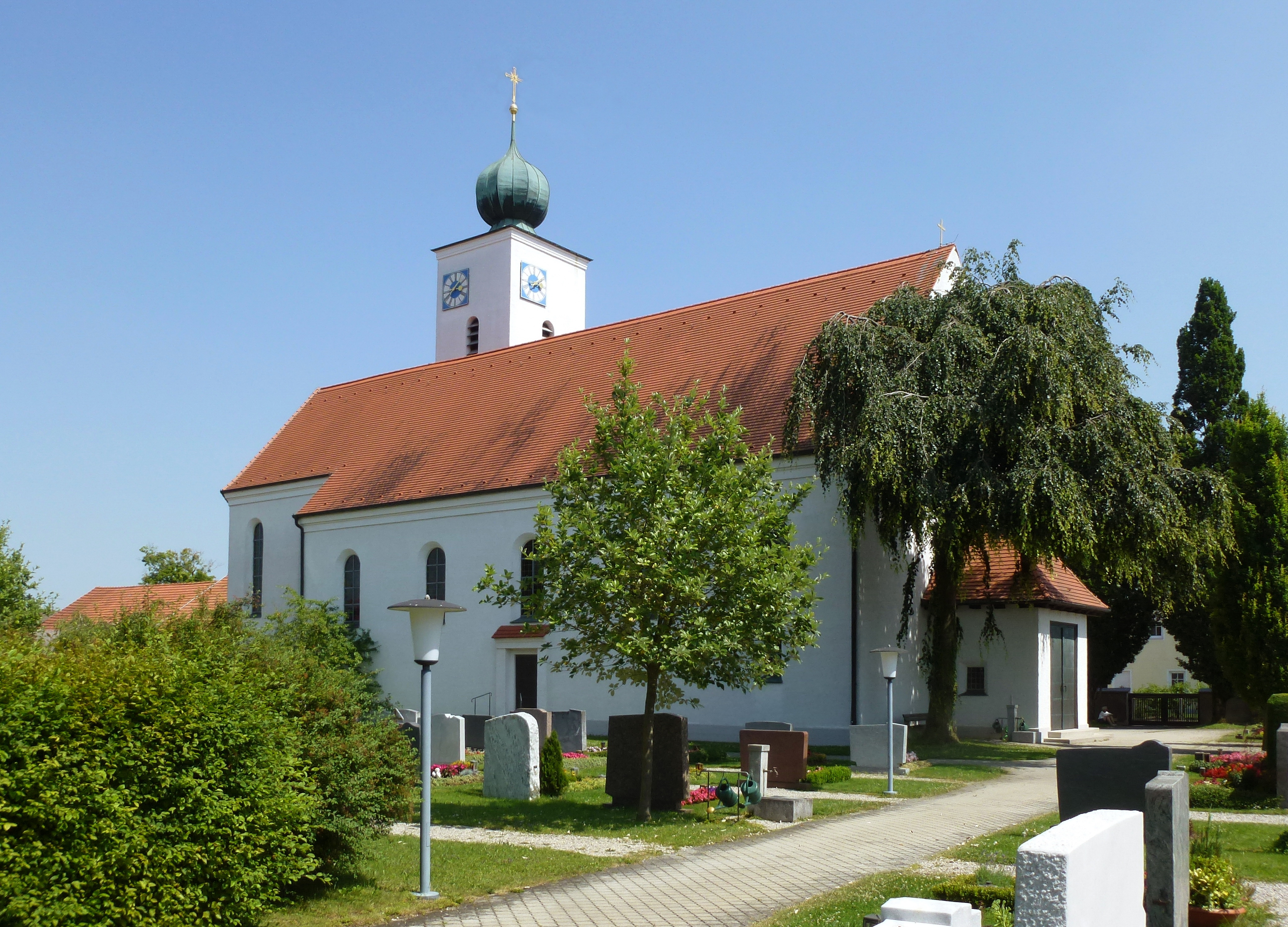 Landsberied, Kirchstr. 3: Katholische Pfarrkirche St. Johann Baptist. Ansicht von NW